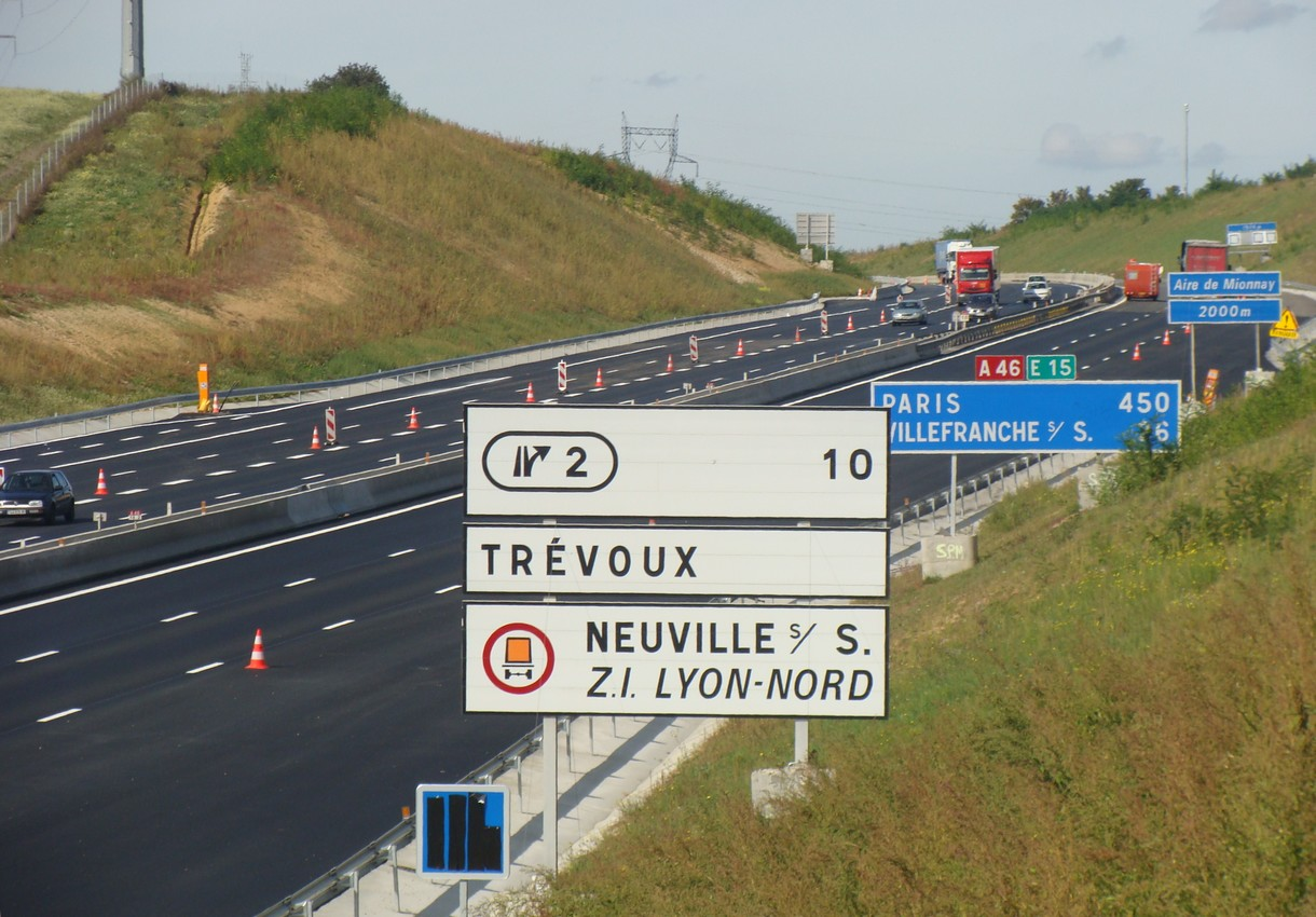 L'autoroute A46, section nord, à l'approche de l'aire de service de Mionnay ; vue prise dans le sens sud-nord, pendant les travaux de raccordement de l'autoroute A 432 (automne 2010).